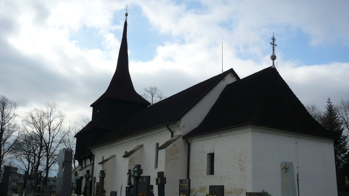 Kostol sv. Mikulasa